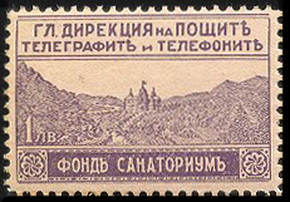 Марка дополнительного сбора, Болгария